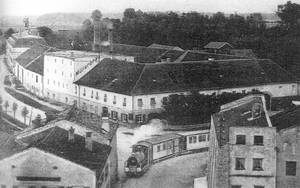 Bockerlbahn in Neuötting